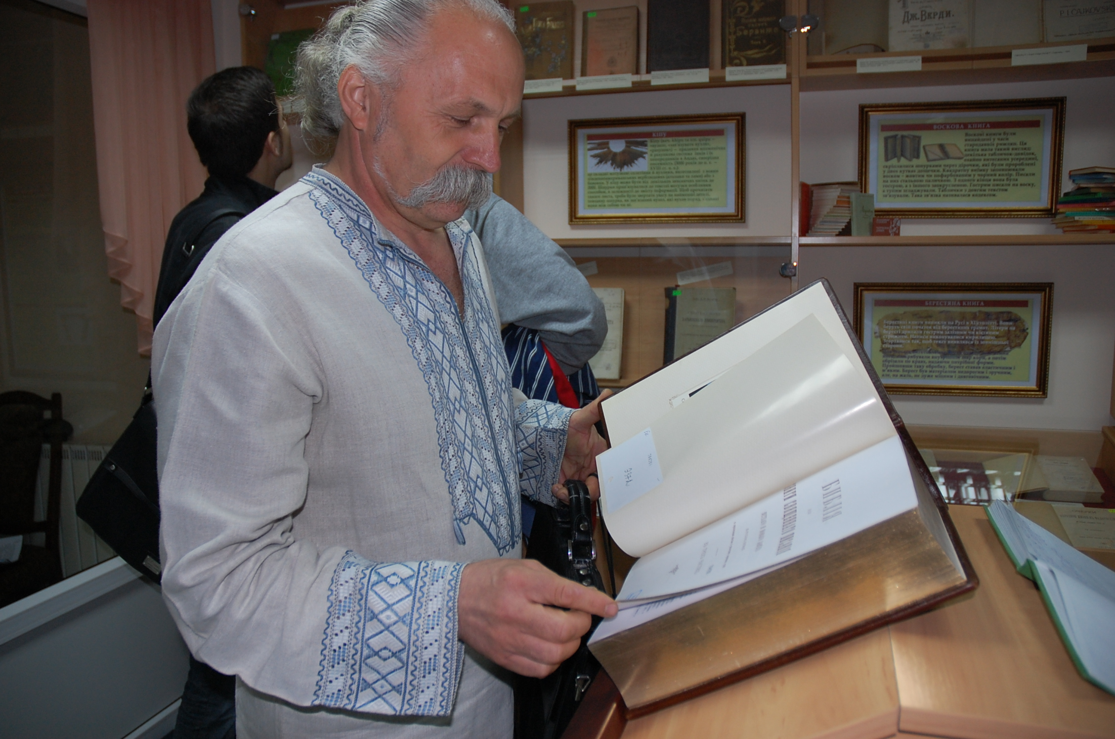 у музеї книги